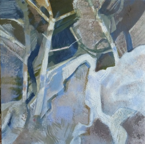 Sur la colline, acrylique et sable sur toile